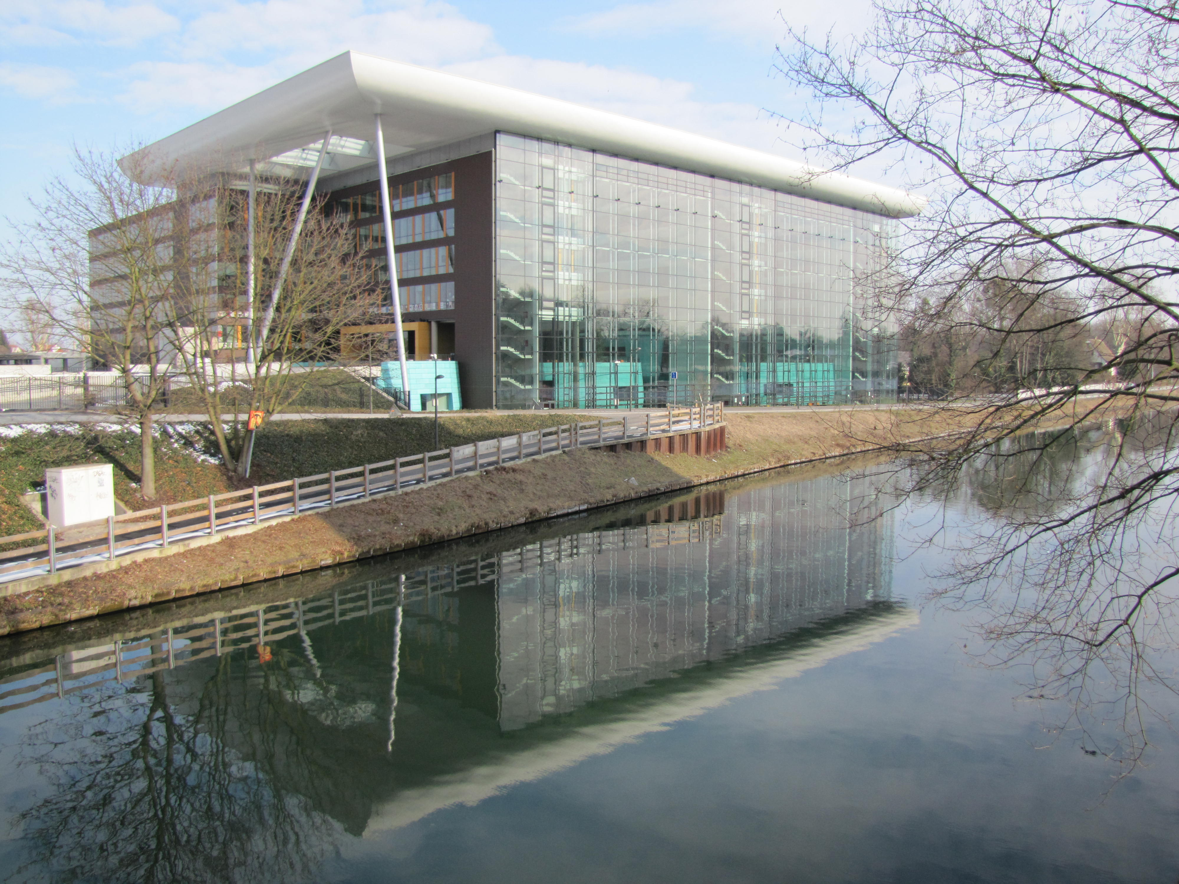 Alsace, Bas-Rhin, Strasbourg, Conseil de l'Europe, Immeuble Agora.